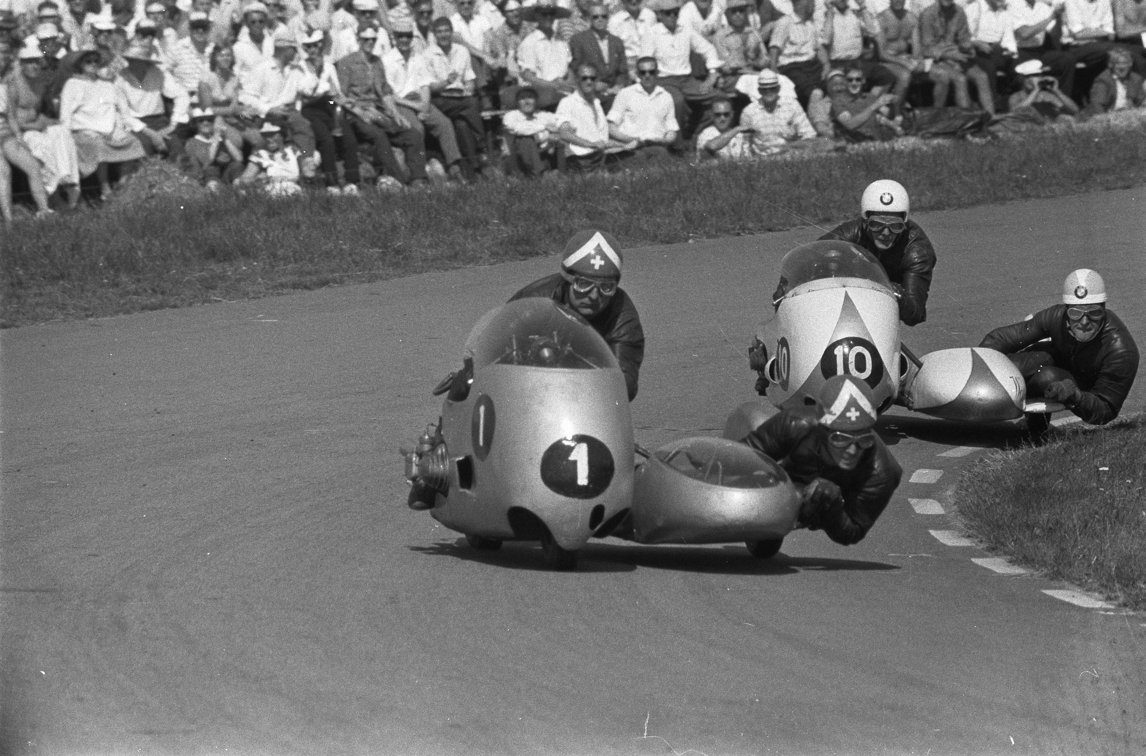 Collectie / Archief : Fotocollectie Anefo Reportage / Serie : TT Assen 1960 Beschrijving : Zijspanrace. (nr. 1 Camathias/Föll) (nr. 10 Harris/Campbell Annotatie : Kregen later pech en finishten niet. Harris en Campbell wonnen de race Datum : 26 juni 1960 Locatie : Assen Trefwoorden : motorsport Instellingsnaam : TT Fotograaf : Bilsen, Joop van / Anefo Auteursrechthebbende : Nationaal Archief Materiaalsoort : Negatief (zwart/wit) Nummer archiefinventaris : bekijk toegang 2.24.01.05 Bestanddeelnummer : 911-3669